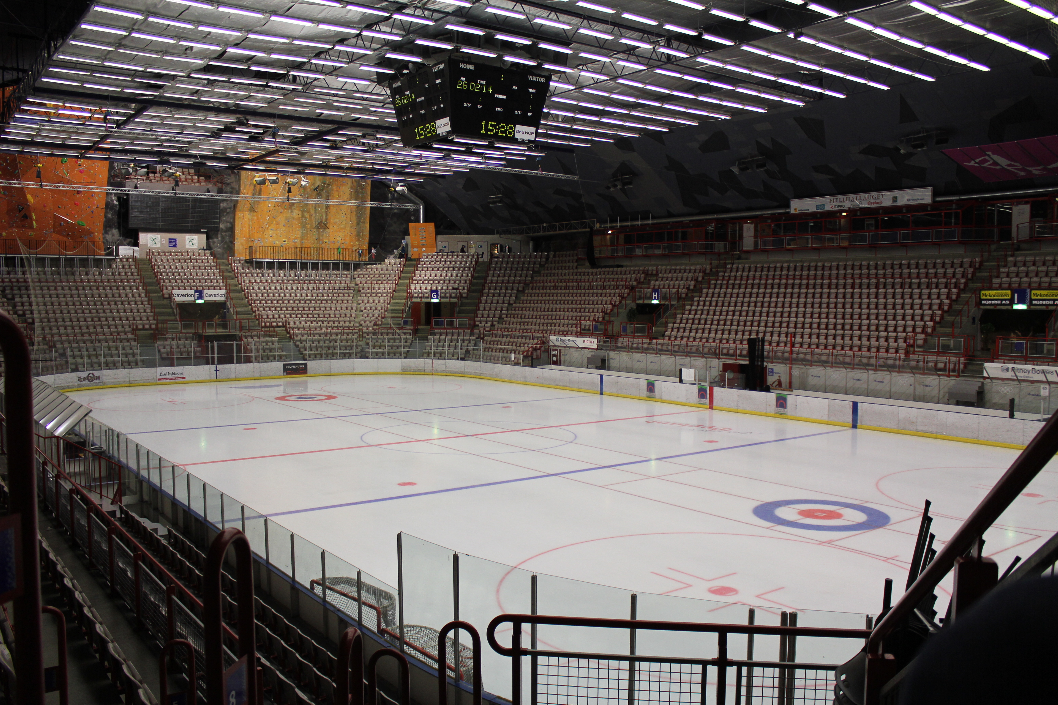 Isbanen i Gjøvik Olympiske Fjellhall.